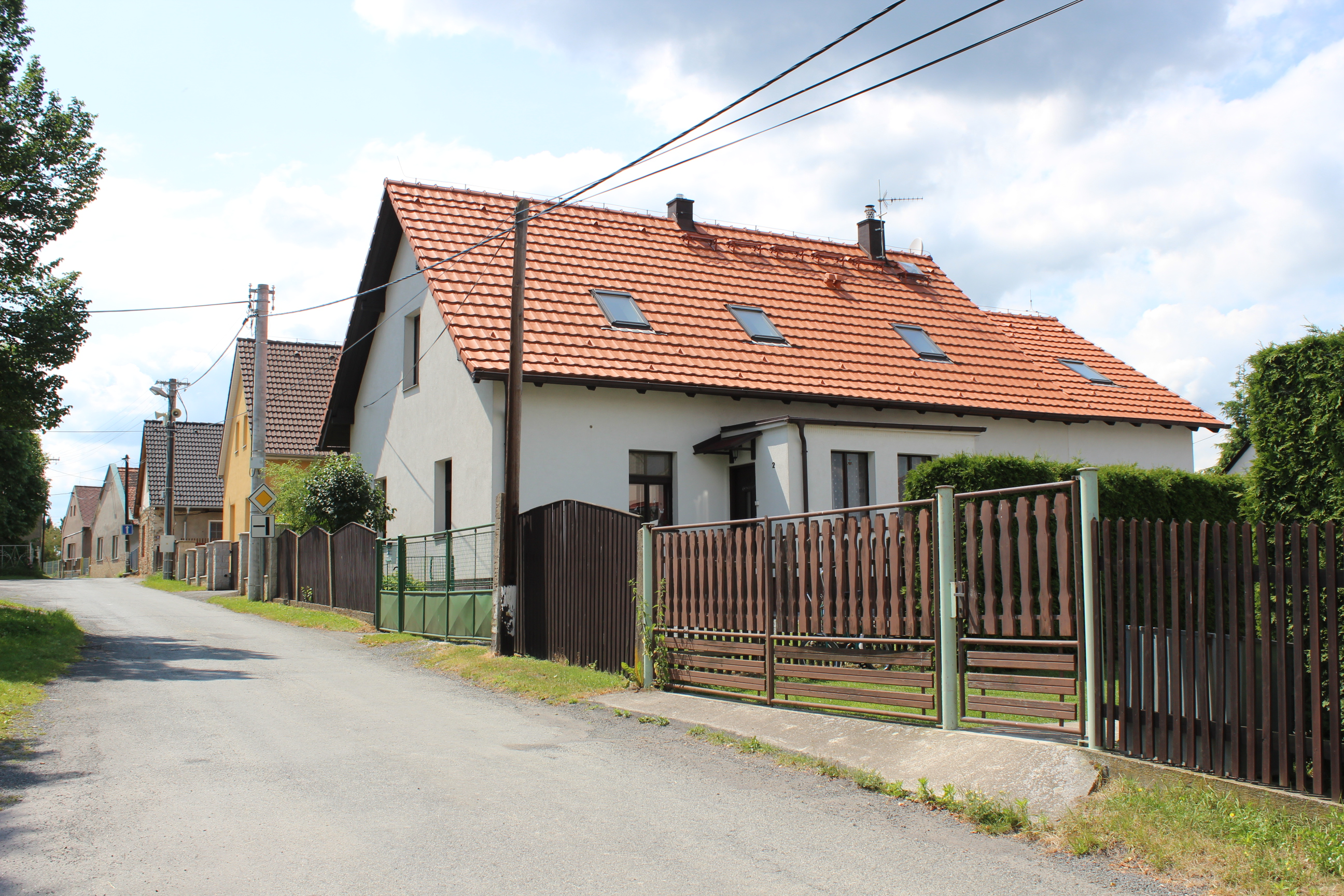 Dům číslo popisné 2 v Újezdu nad Zbečnem.